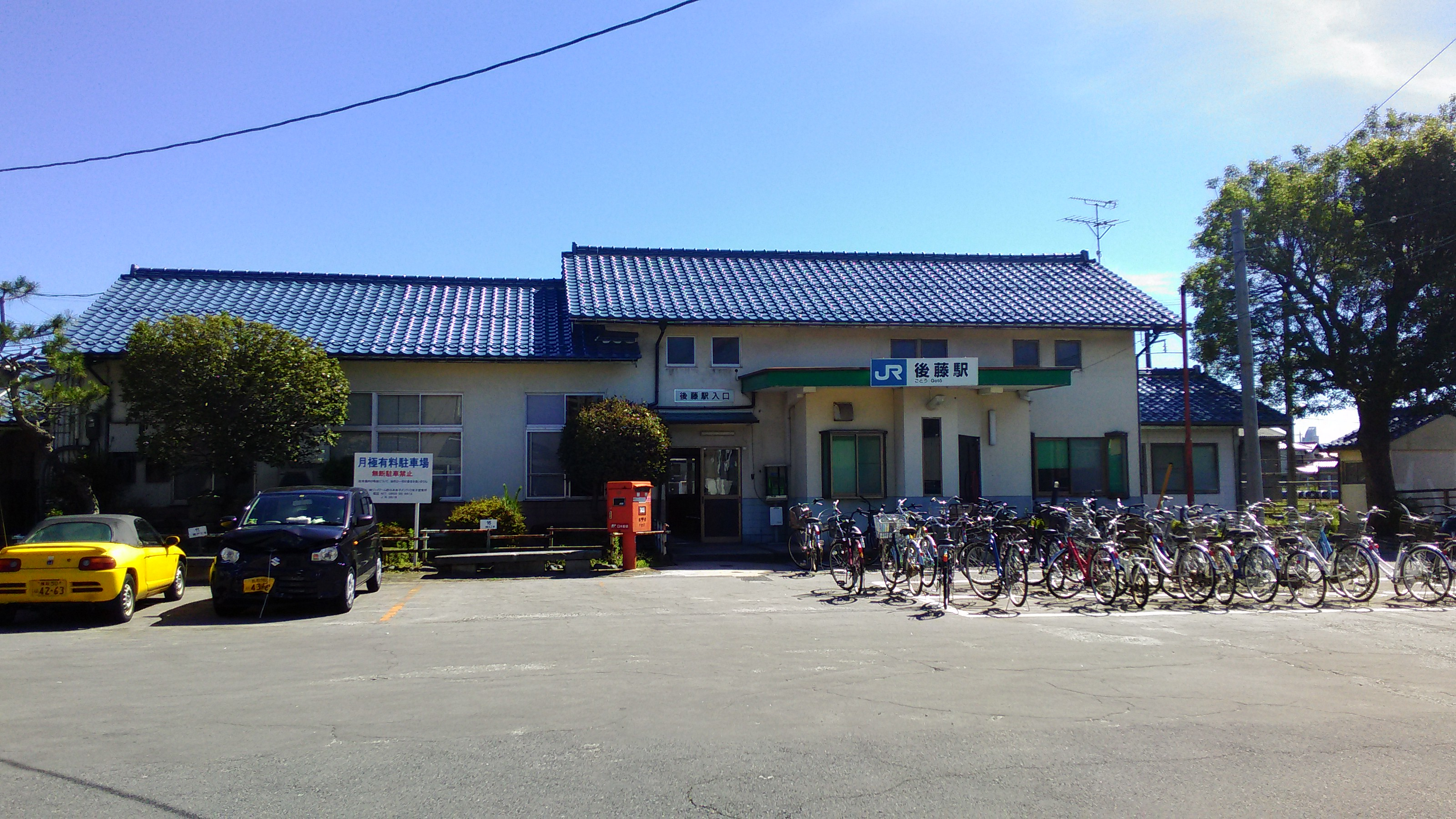 JR西日本境線後藤駅